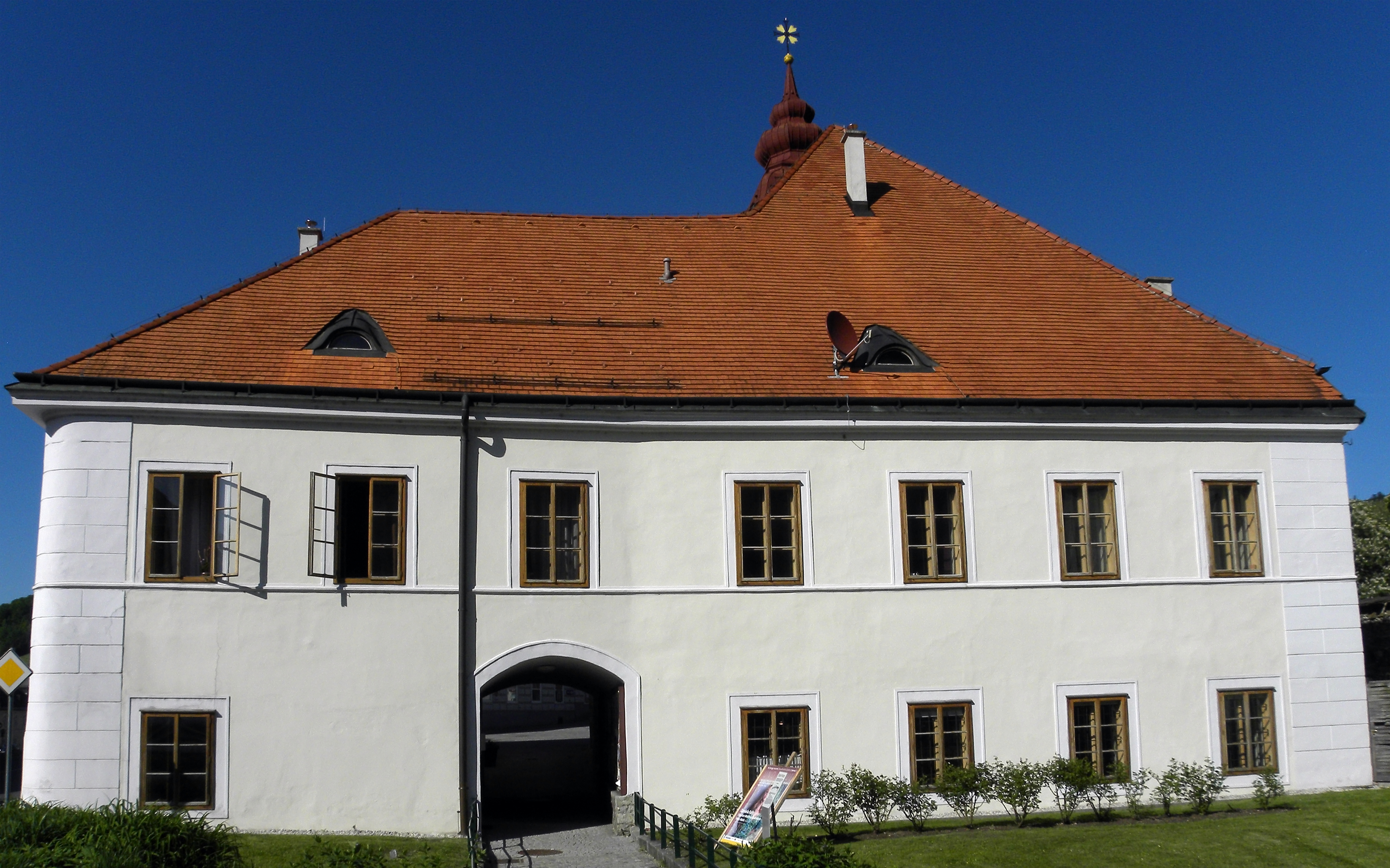 Das an die Bürgerspitalkirche angeschlossene Bürgerspital mit Durchgang